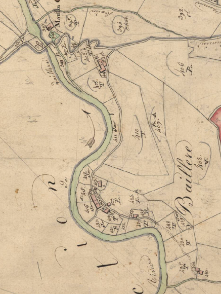 Vallera en el Cadastre napoleònic del 1812 (Arxius Departamentals dels Pirineus Orientals)